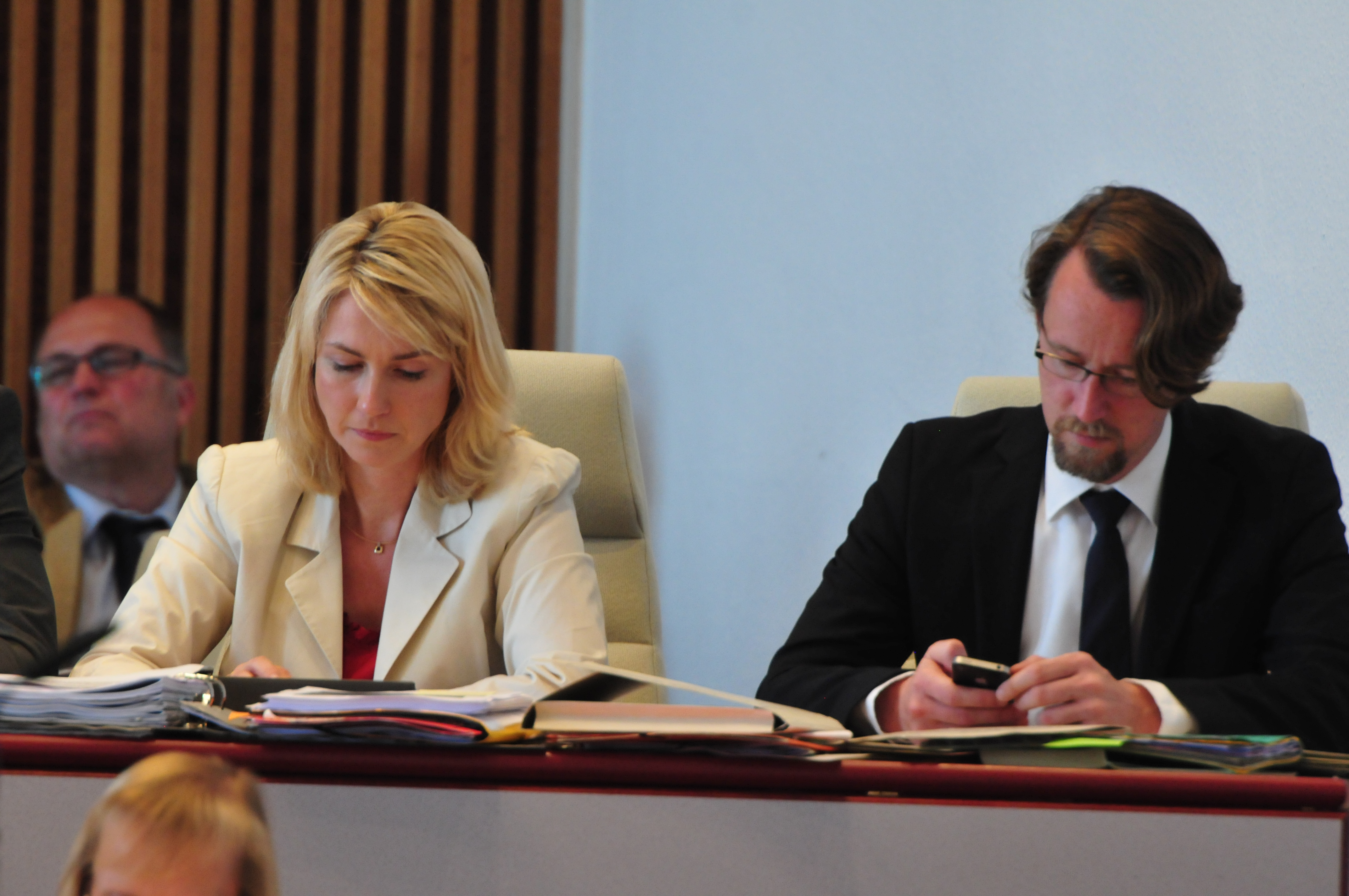 Landtagssitzung des Landtages von Mecklenburg-Vorpommern in Schwerin am 19. Juni 2013.